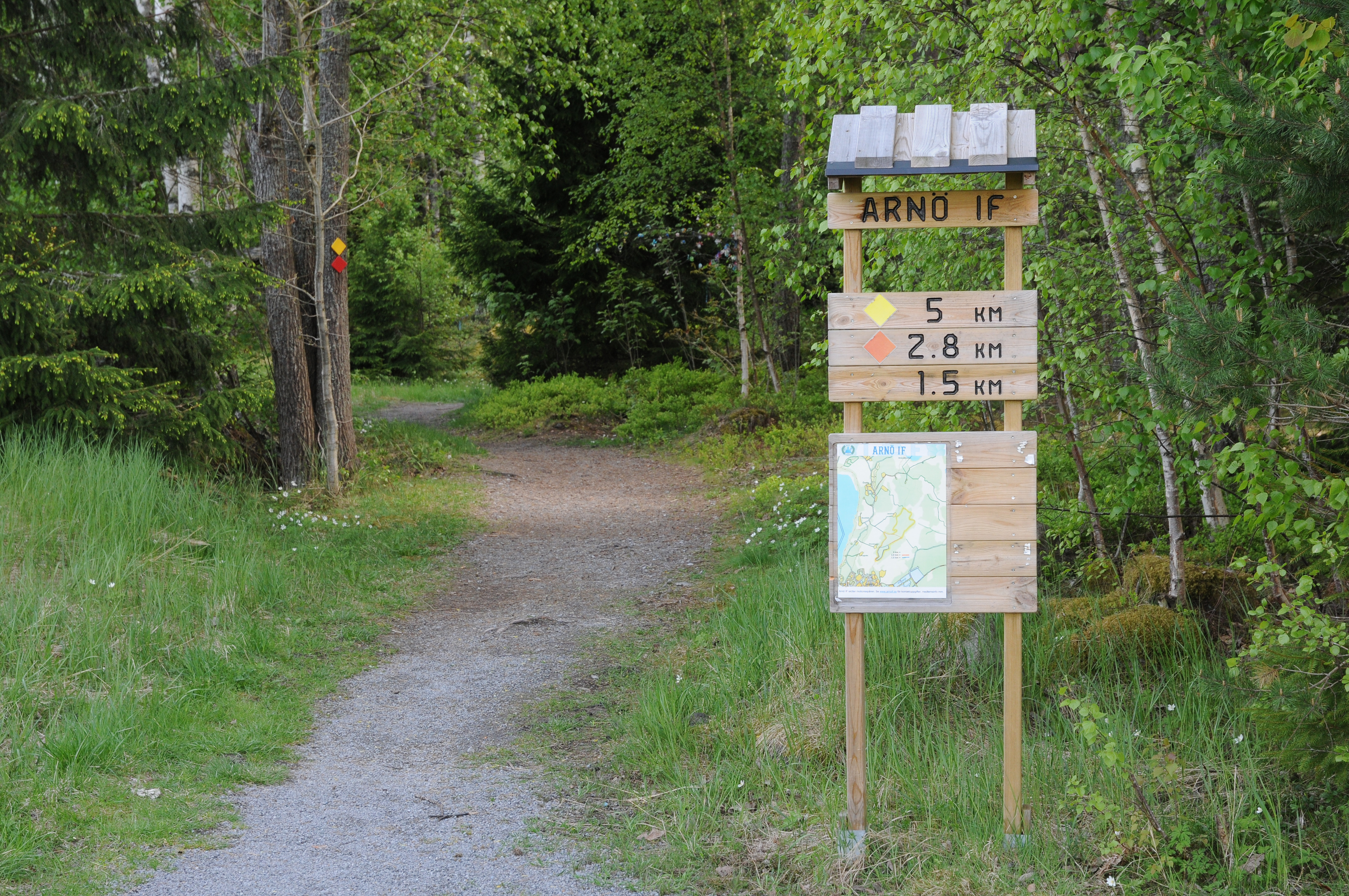 Motionsspår i Janstorpsskogen på Arnö, Nyköping